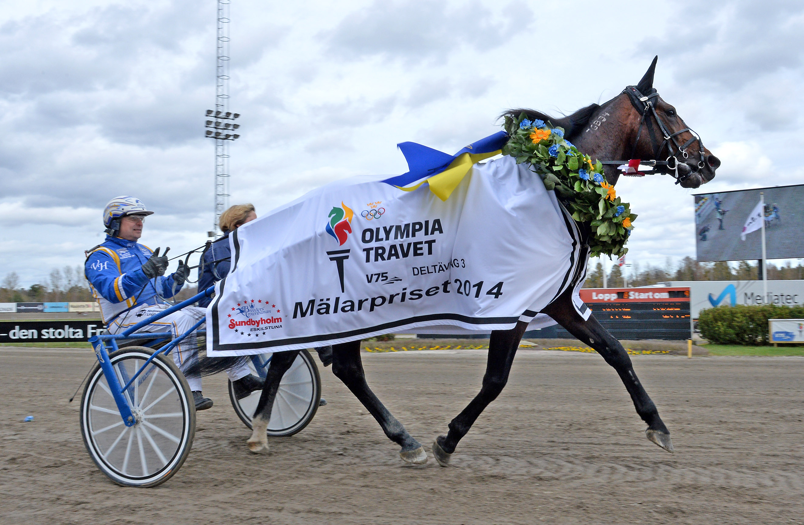 Kusken Veijo Heiskanen och travaren Solvato segerdefilerar efter att ha vunnit Olympiatravet 2014 på Åby travbana.